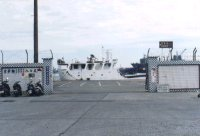 高雄港新濱碼頭